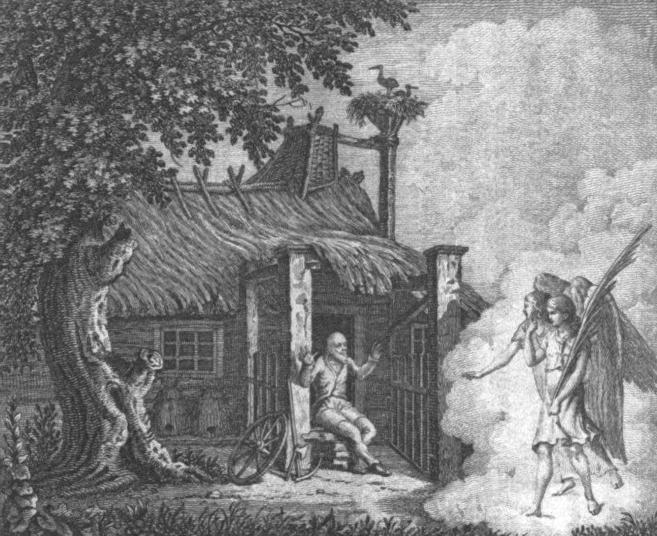 ilustracje z książki PL publikacja Drukarni nro 646 Nowolipie Warszawa 1816